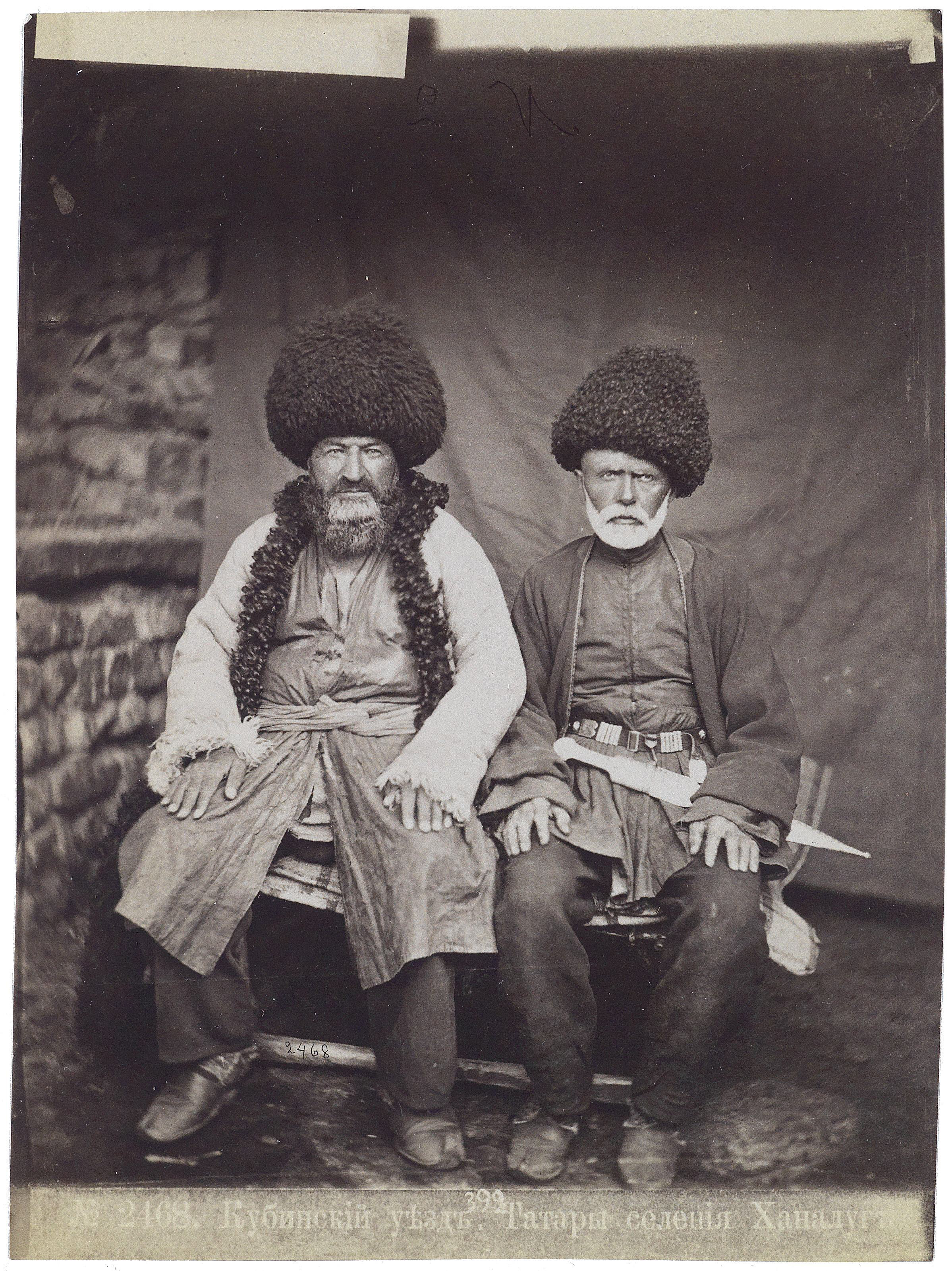 Zwei Tartaren aus dem Dorf Khanalug im Kubinski-Bezirk, im Negativ nummeriert, mit beibelichteter Nummerierung und Titel (kyrillisch), 2468, 392, auf der Rückseite mit Bleistift beschriftet, 16 x 11,7 cm